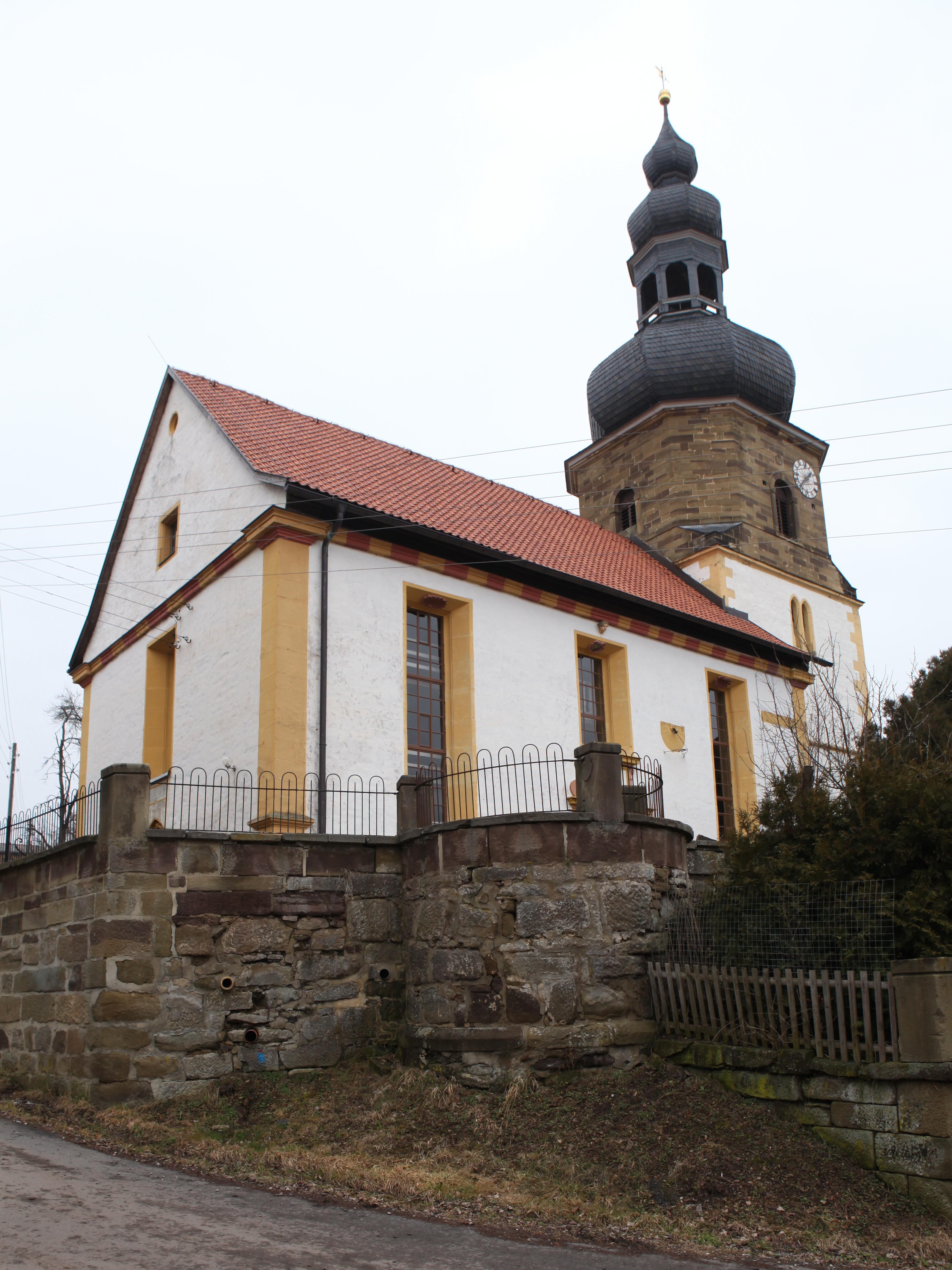 Ev. Kirche St. Kilian Bedheim, OT von Gleichamberg, Landkreis Hildburghausen